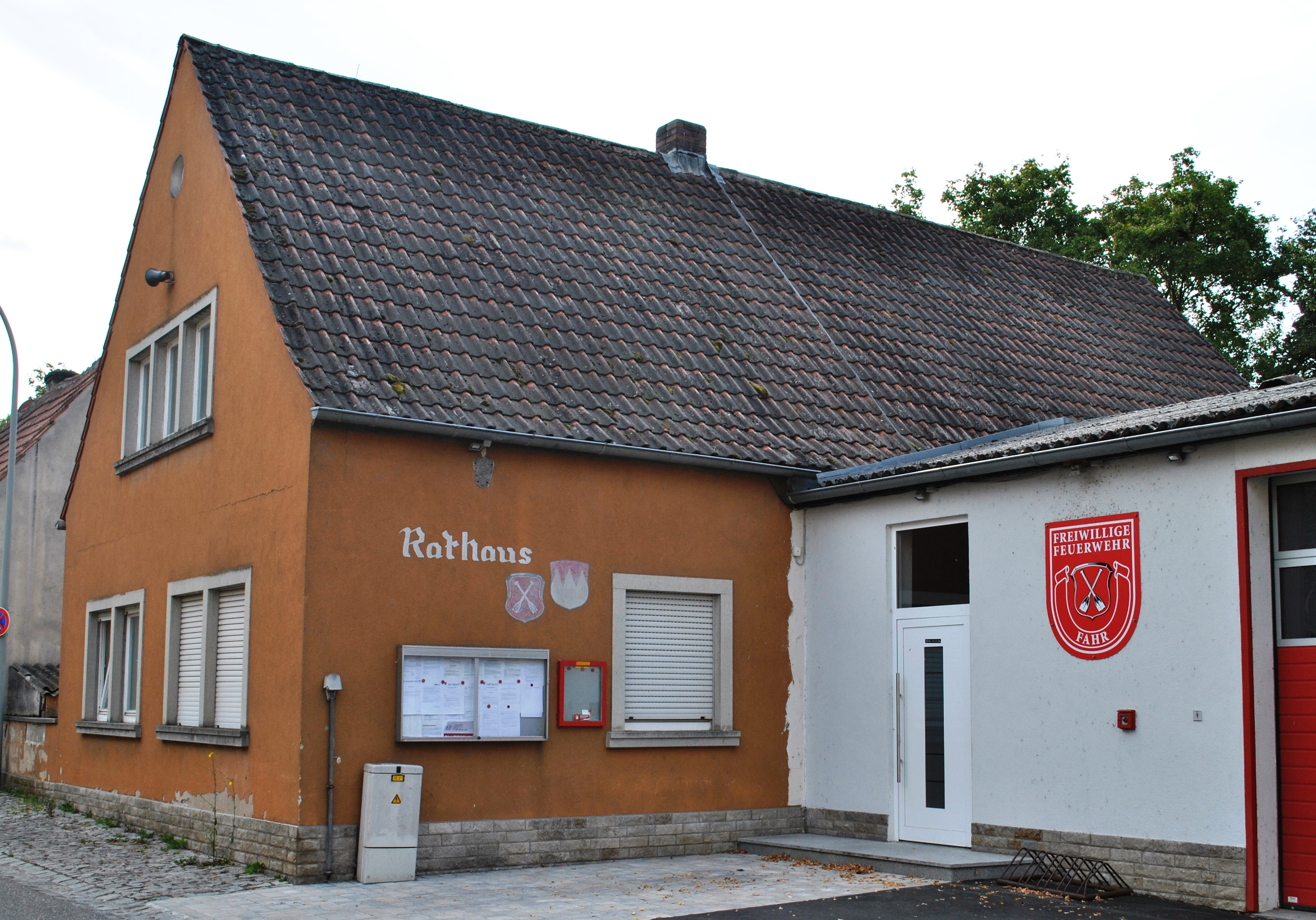 Ehemaliges Rathaus, Fahr, Maingasse 3